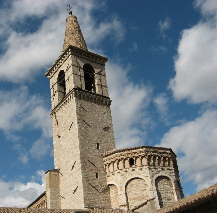 Cagli, Chiesa di San Francesco, part. campanile ed abside.